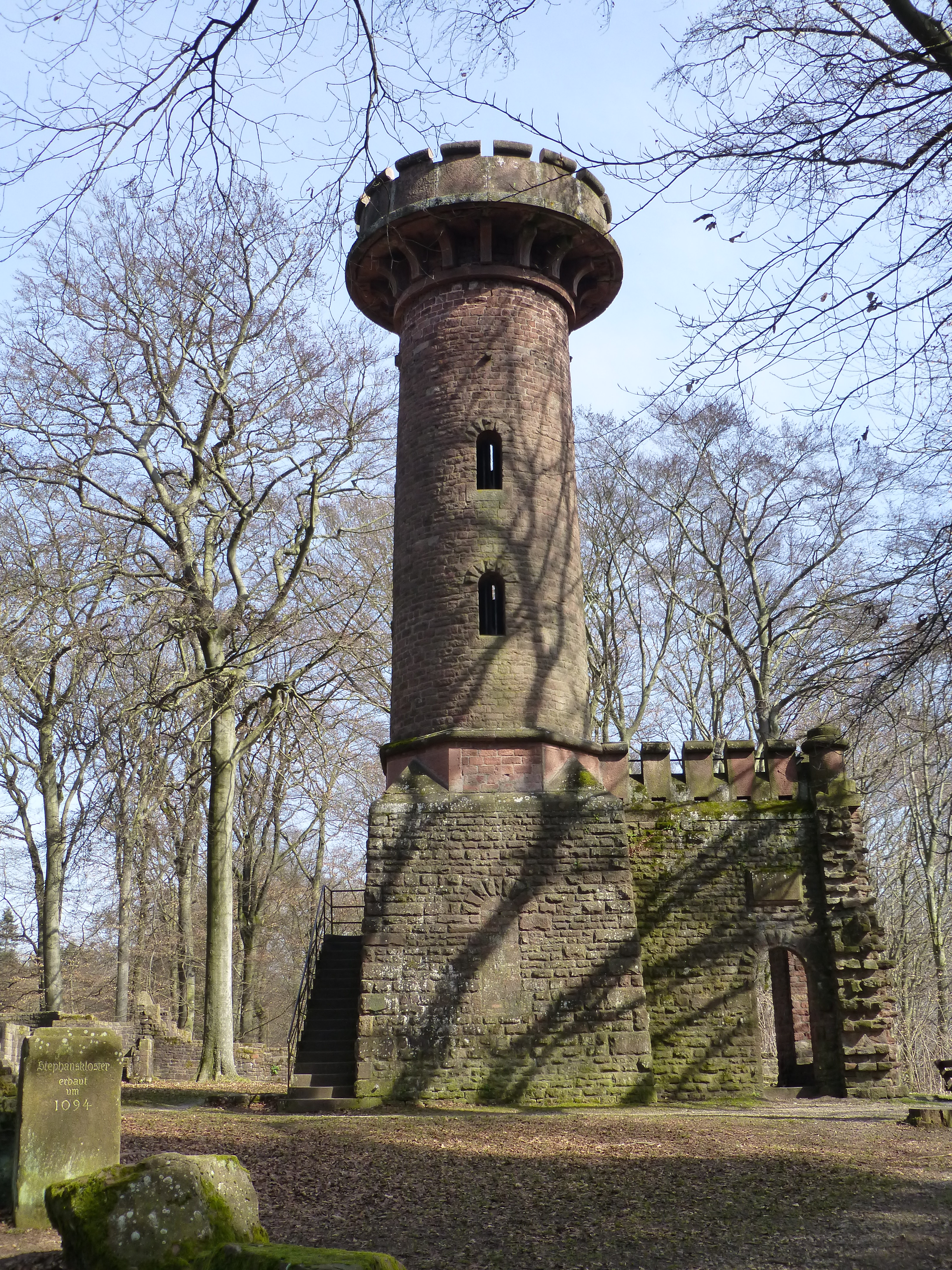 Heiligenbergturm, Blick von der Straße